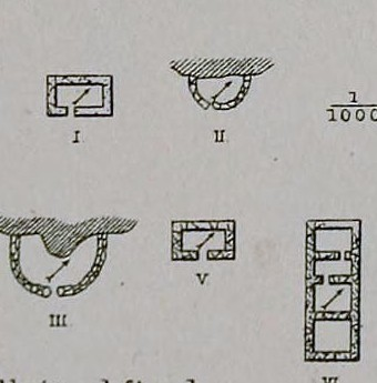 Vestiges Kagdlimiut Vatnahverfi.